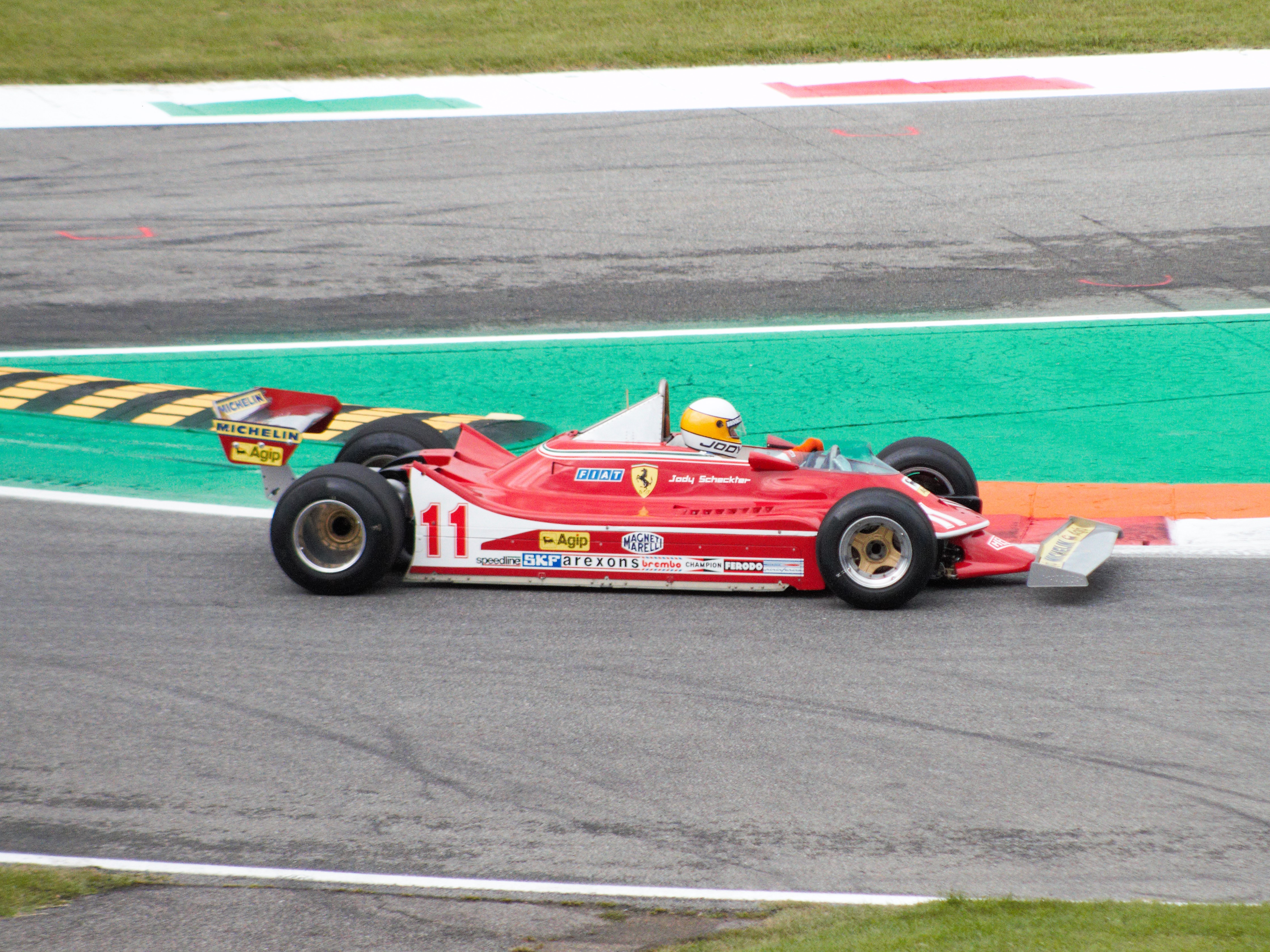 Jody Scheckter a Monza il 6 settembre 2019